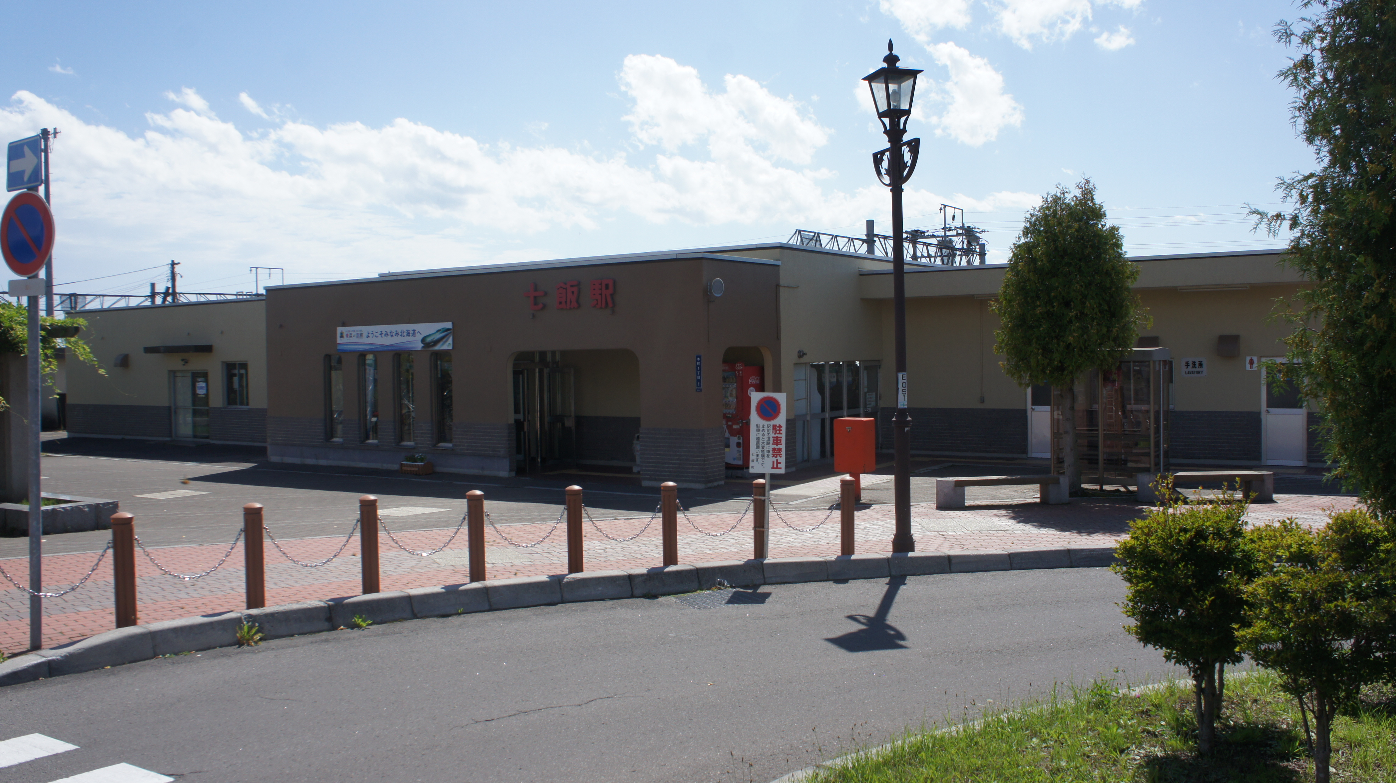 JR函館本線・七飯駅の駅舎 Sony NEX-3